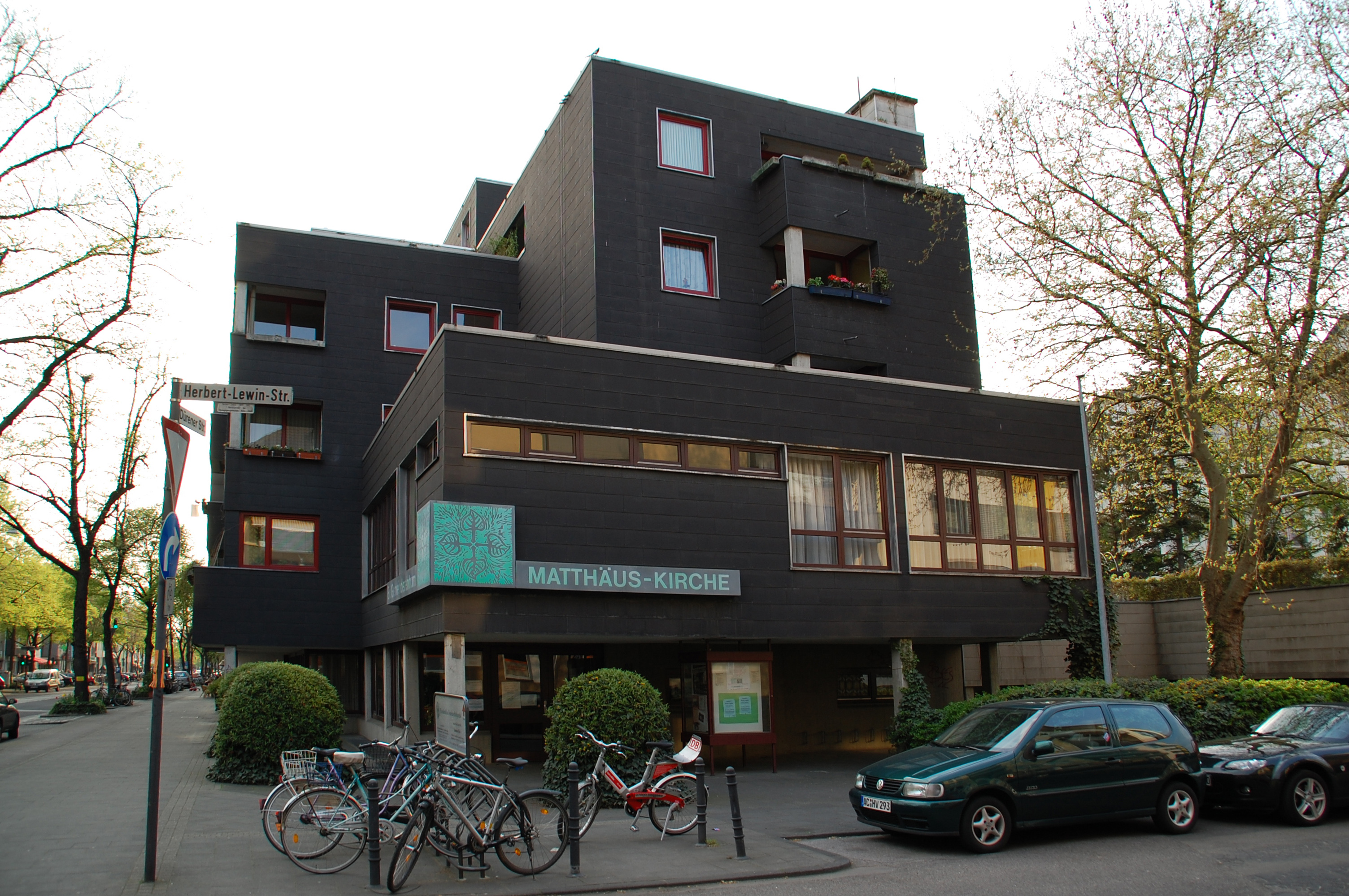 Matthäus-Kirche Lindenthal, Cologne, Germany